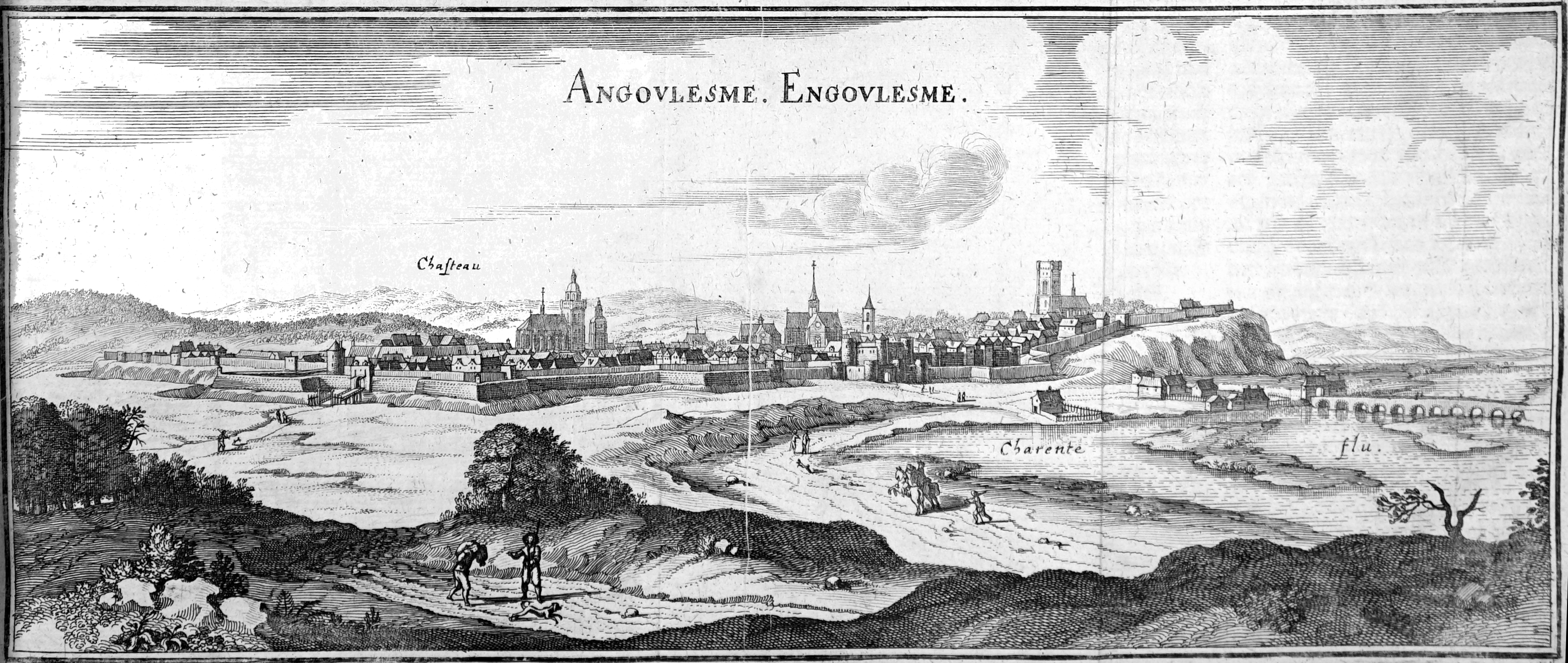 vue de la ville in ː TOpotgraphiae Galliae.